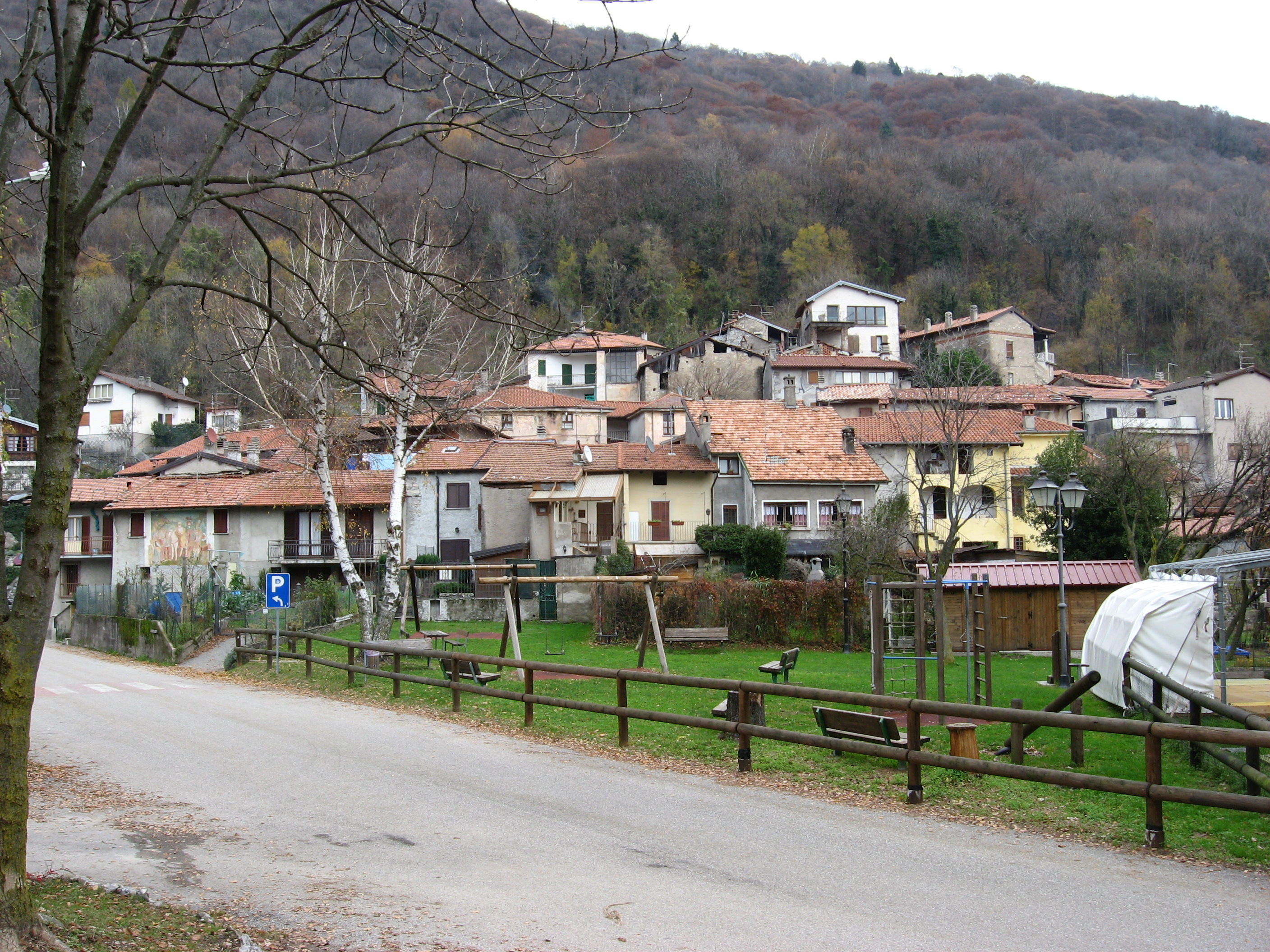 Veduta di Arcumeggia, paese dipinto